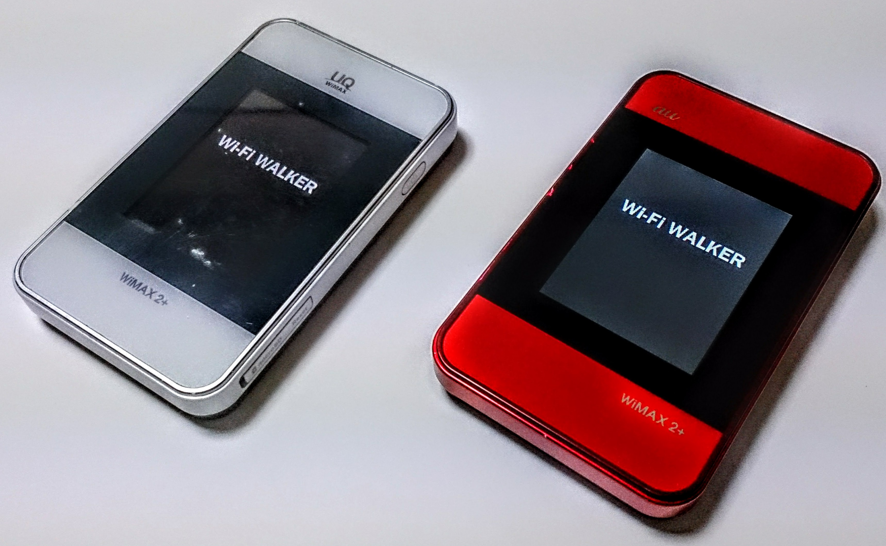 二色のHWD15